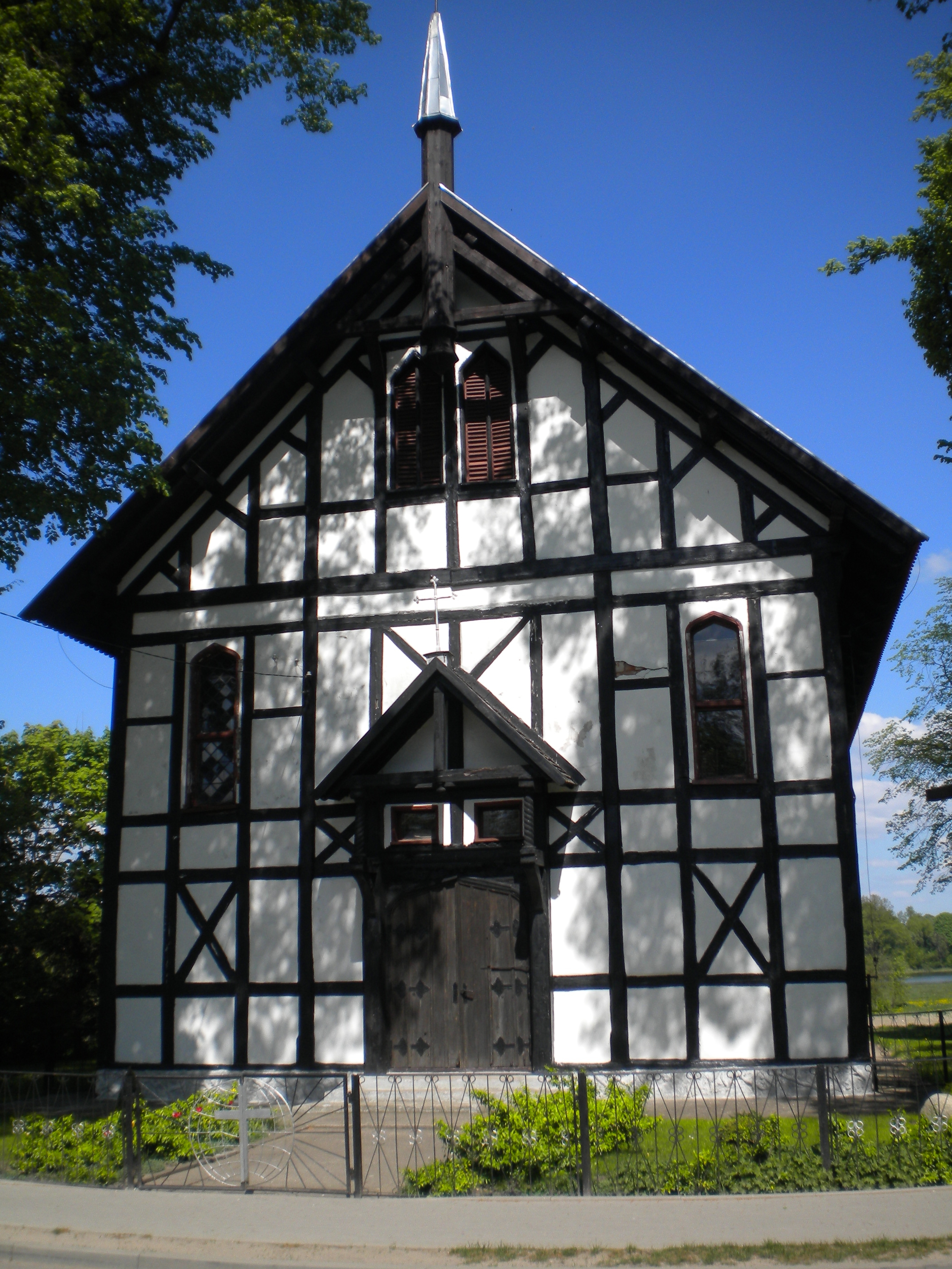 Kraplewo - dawny kościół ewangelicki, ob. metodystów pw. Św. Trójcy z cmentarzem przykościelnym, 1848